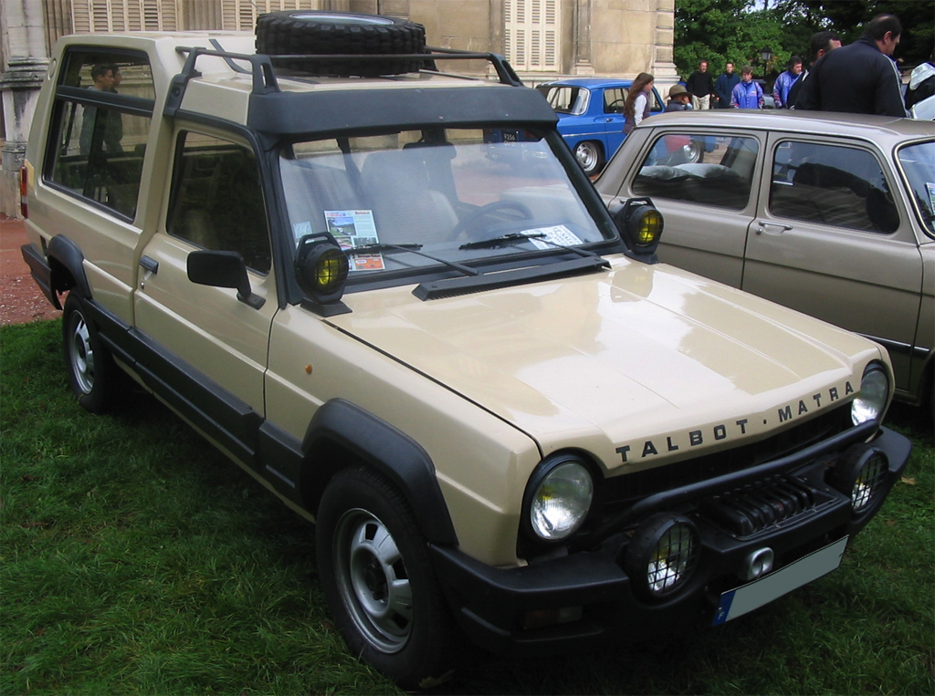 Automobile Matra Rancho photographiée lors d'un rassemblement d'anciennes à Sathonay (Rhône)